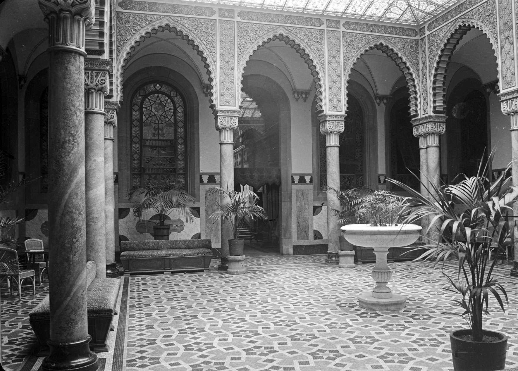 Maurische Halle im Eberhardsbad in Wildbad im Schwarzwald